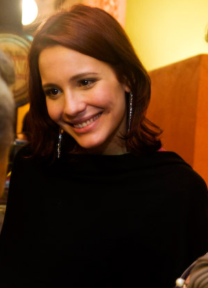 Juliana Knust num casamento.